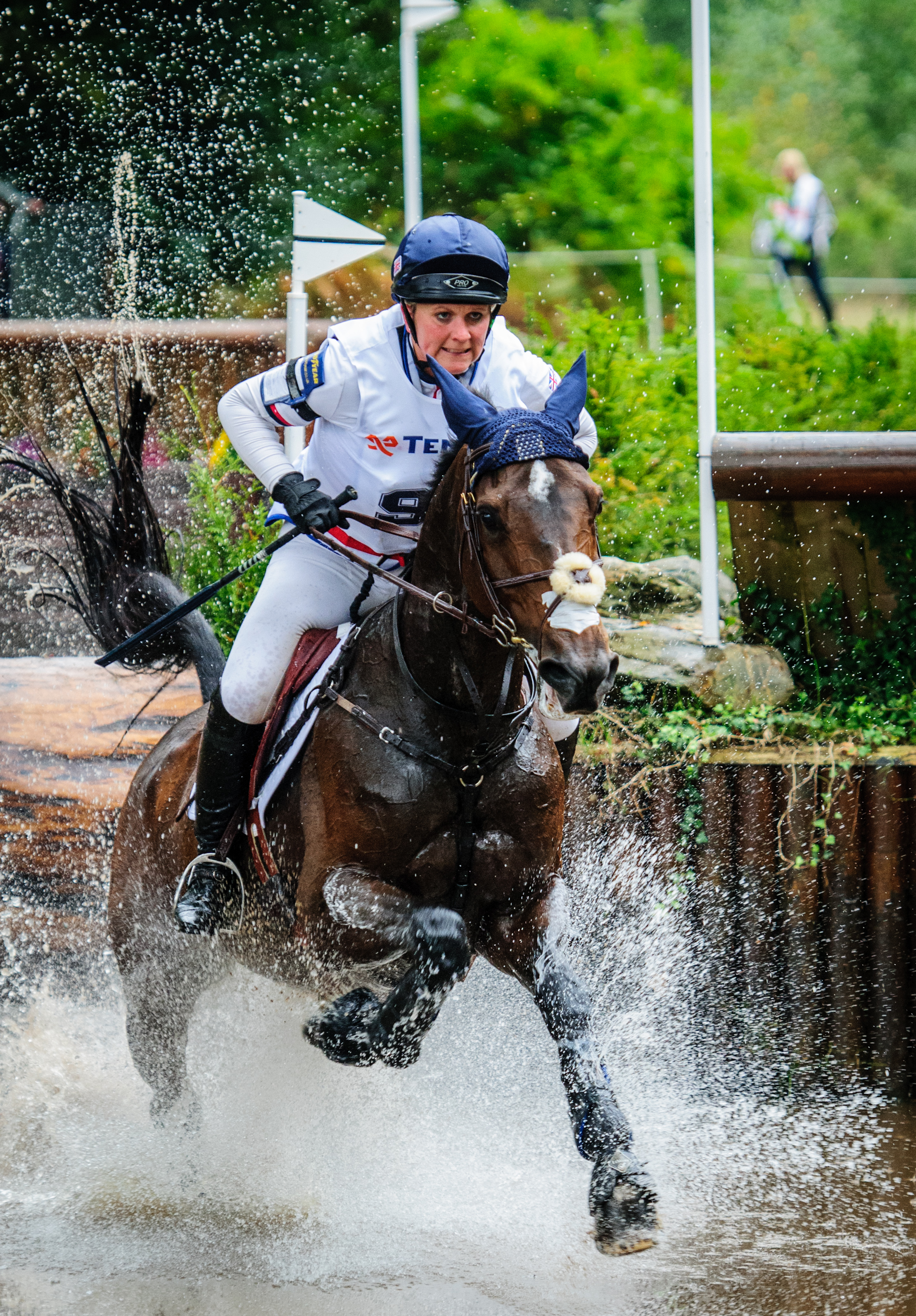 Military Boekelo 2013